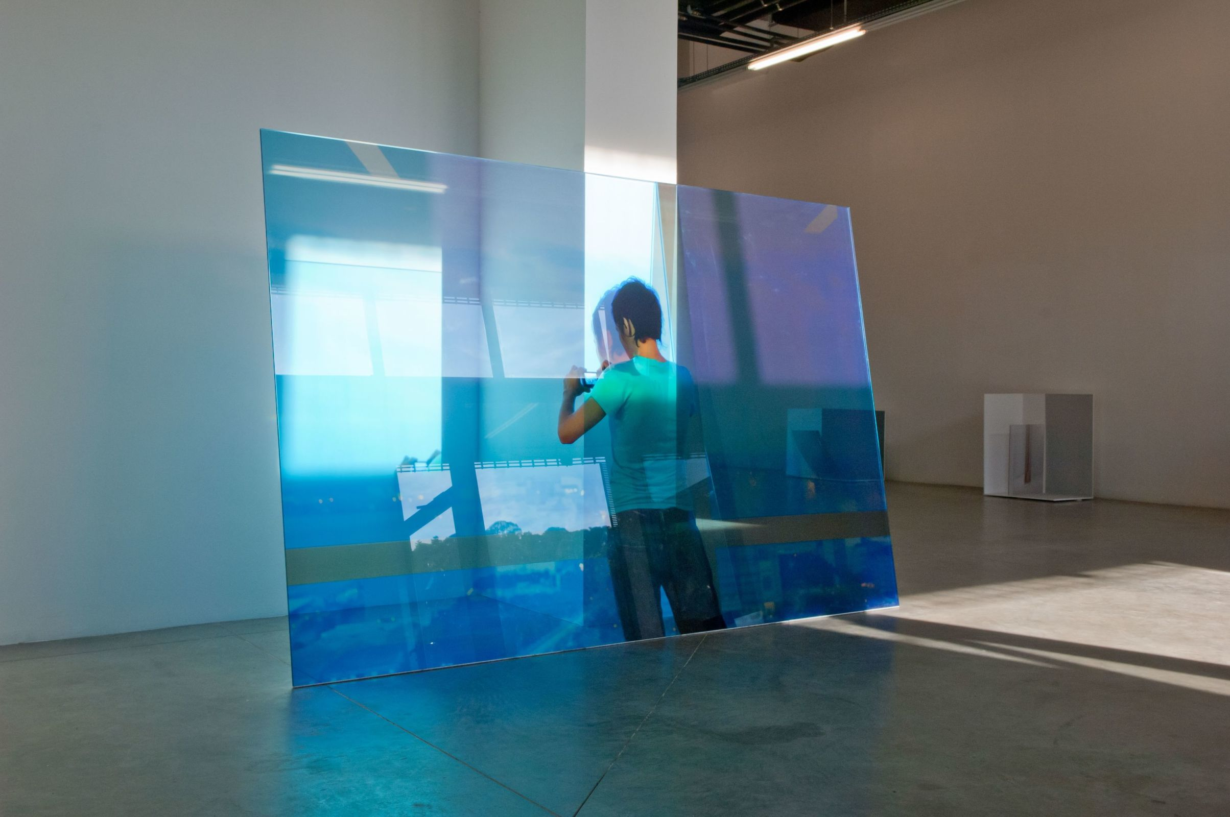 Tokyo bay, 2010 Tirage film polyester encapsulé et Evasafe de Bridgestone, verre extra-clair, 270 × 180 cm Vues de l'exposition Polygone, Olivier Houg Galerie, Lyon